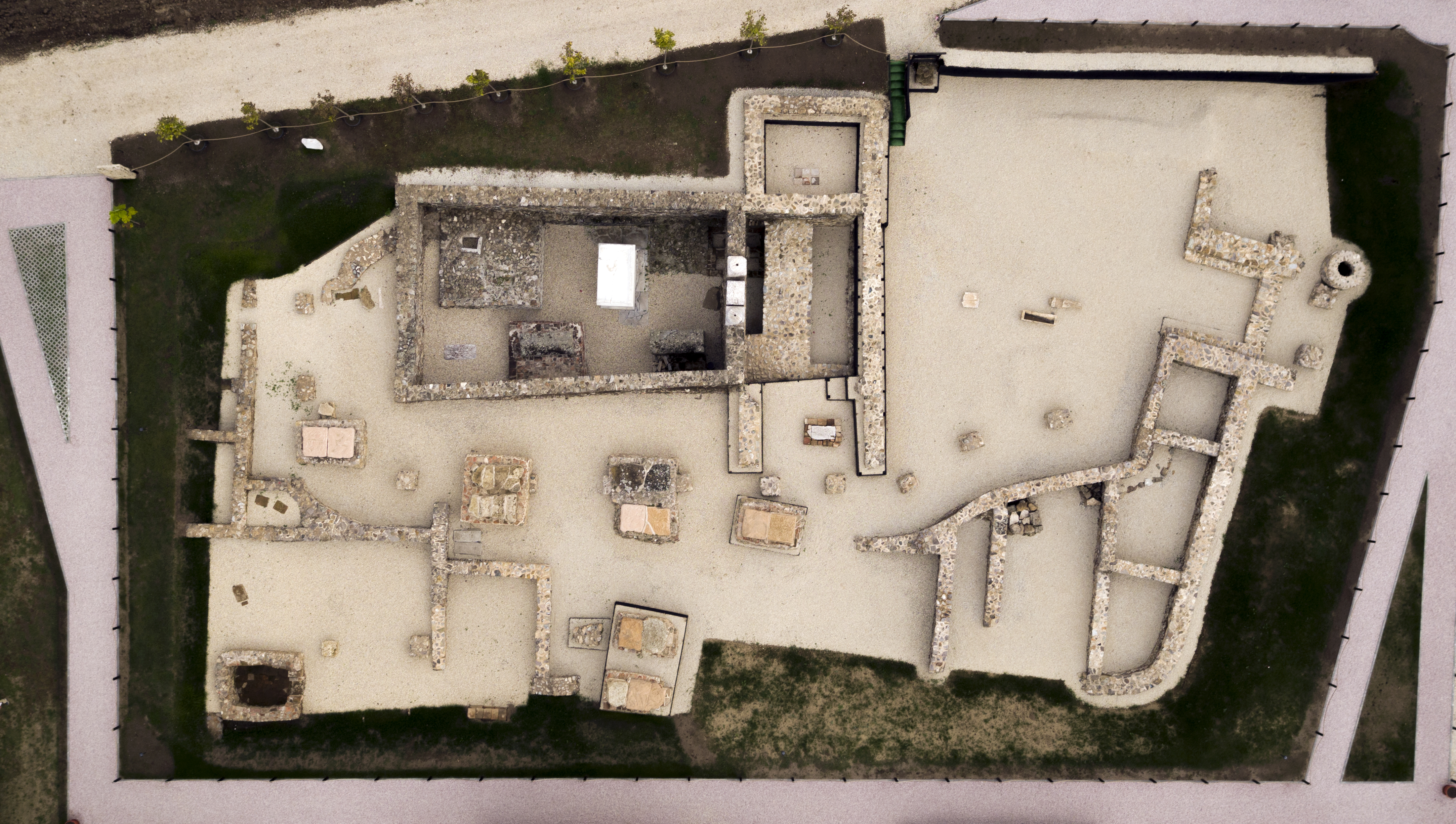 Nekropolë në Graçanicë